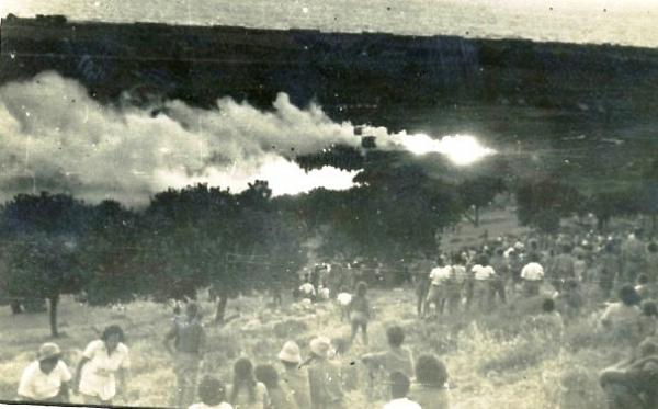 אש בשדות גן-שמואל במאורעות 1936-9